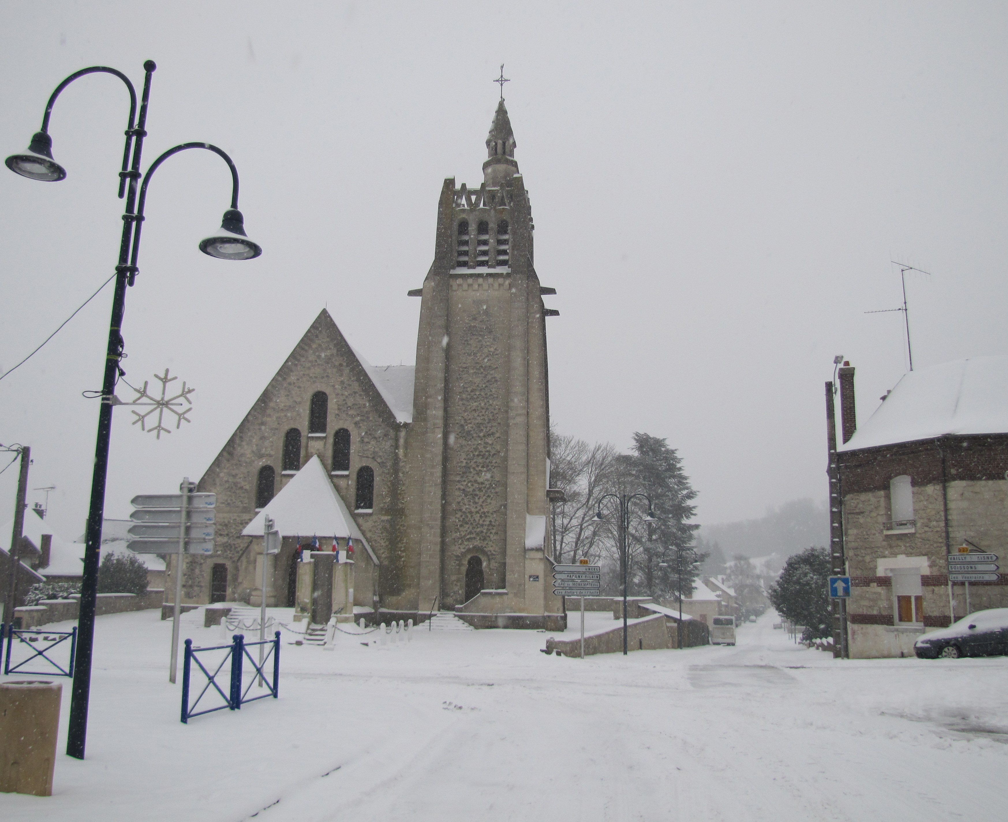 Eglise du village prise de la route qui mène à Pinon.